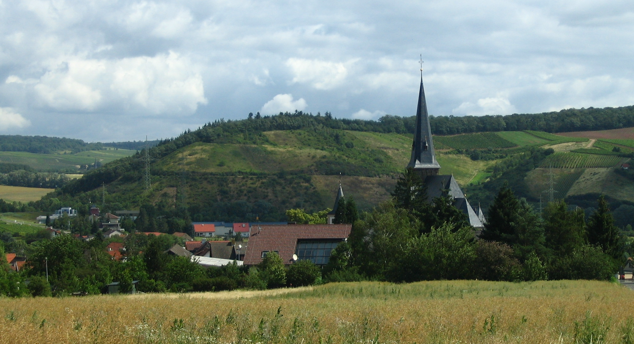 Windesheim in the Guldenbach Valley, Germany